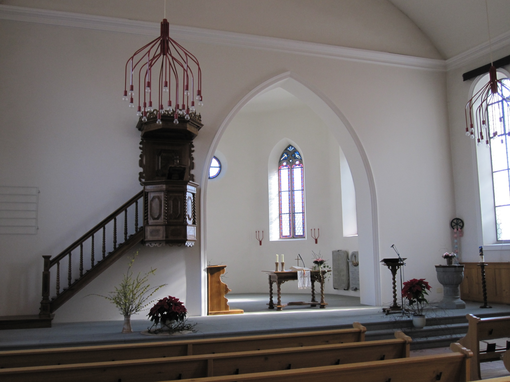 reformierte Kirche in Bussnang (Kanton Thurgau)